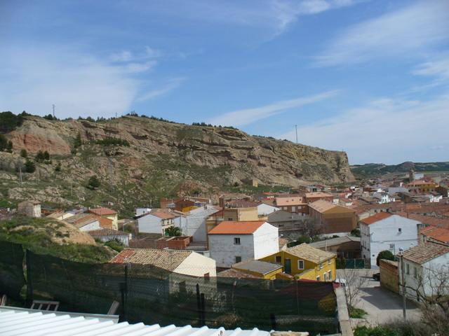 Vista del municipio de Lodosa, Navarra